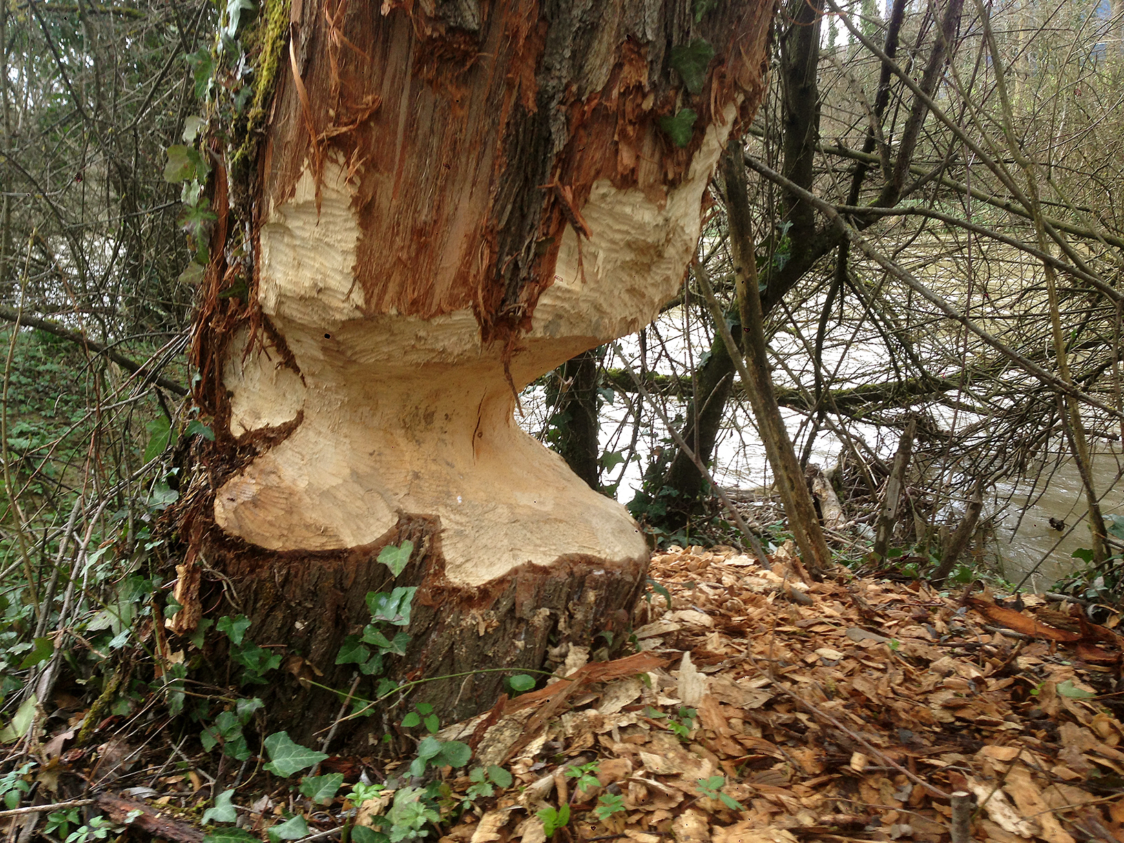 Biberfrass an der Birs